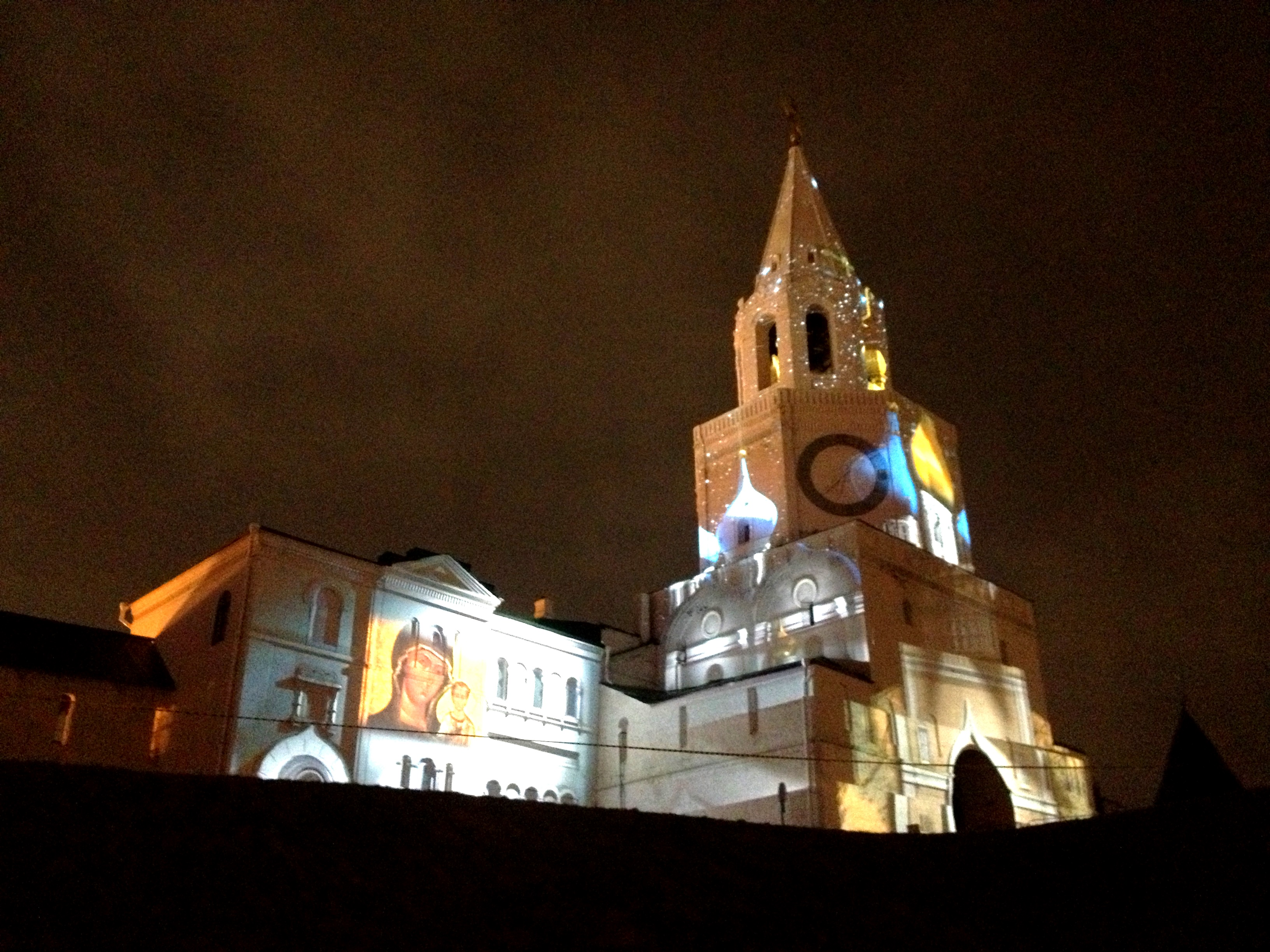 Спасская башня Казанского Кремля (новогодняя подсветка).